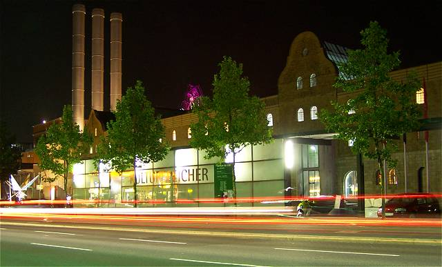 Kulturspeicher & Veitshöchheimer Straße bei Nacht